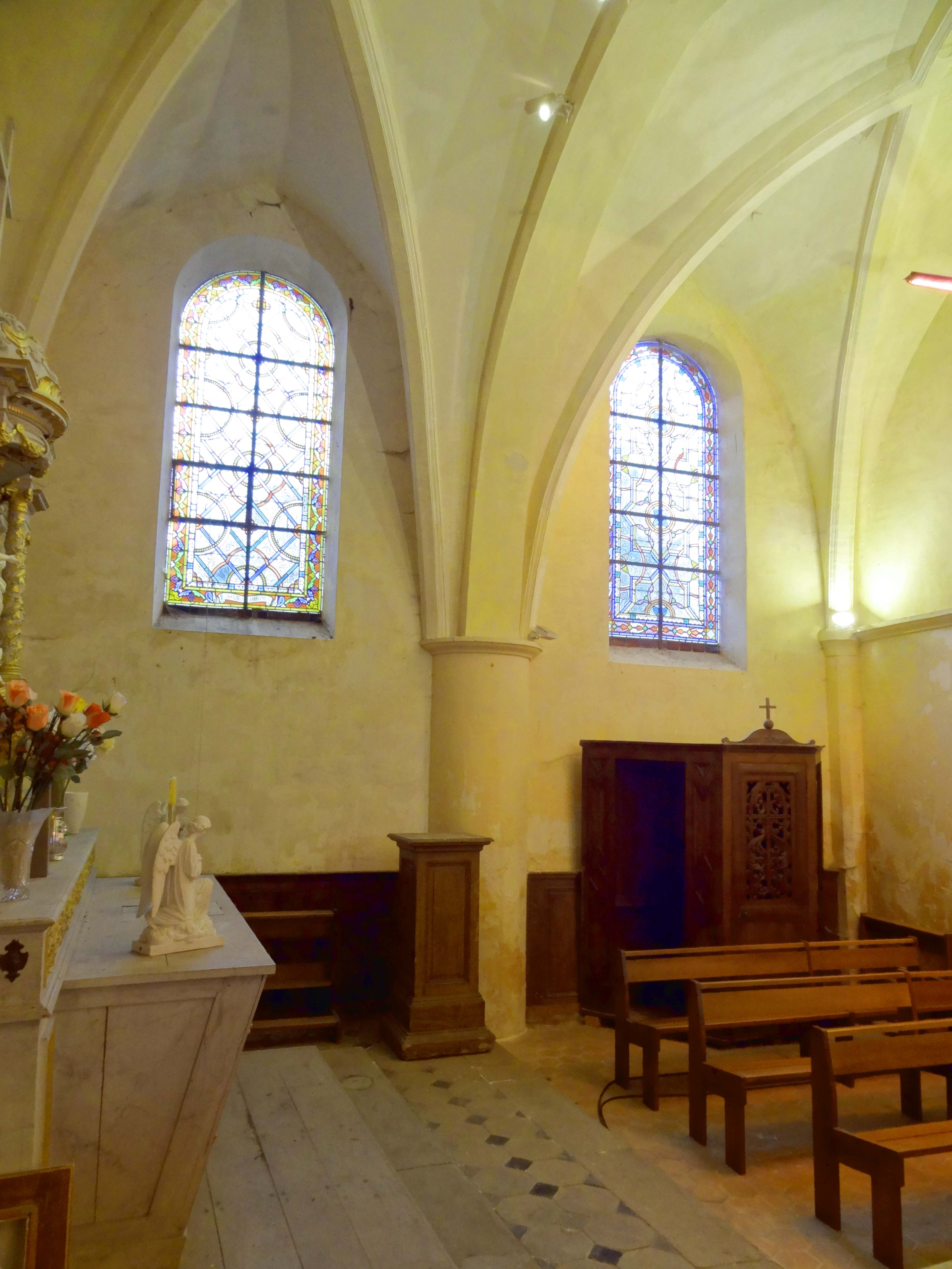 Intérieur de l'église - voir titre.